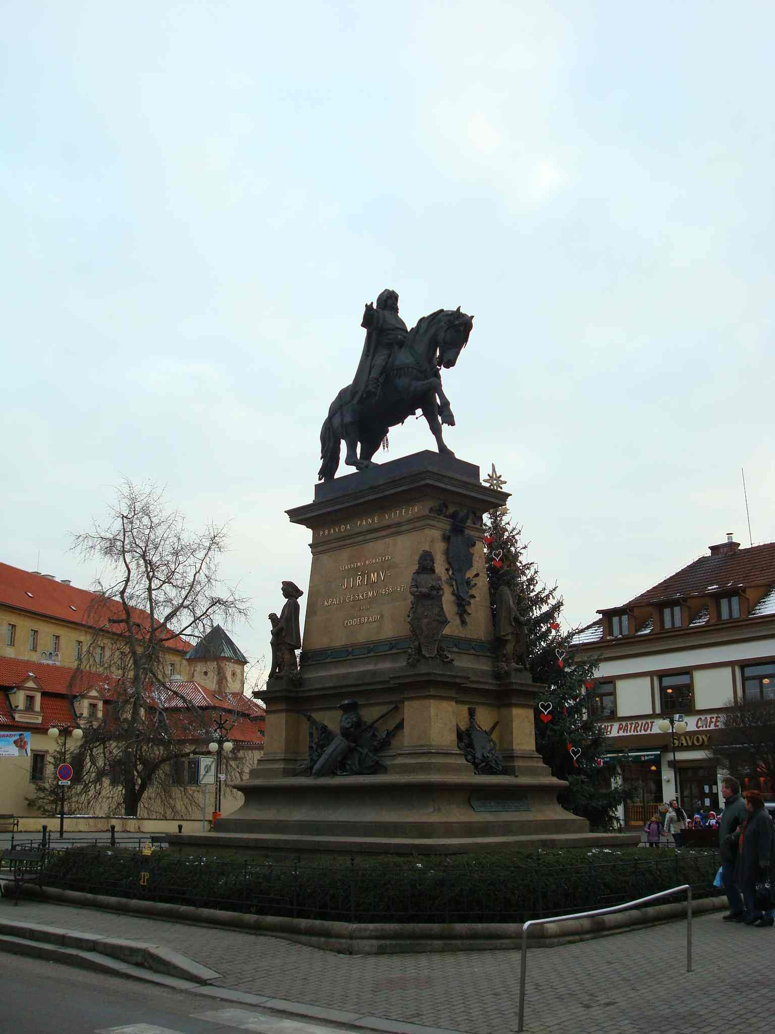 Подебрады. Памятник королю Йиржи.